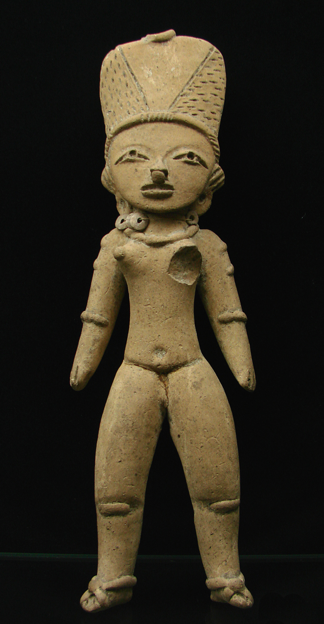 Statuette, culture Huaxtèque (900-1500 + JC).Musée d'Auch.